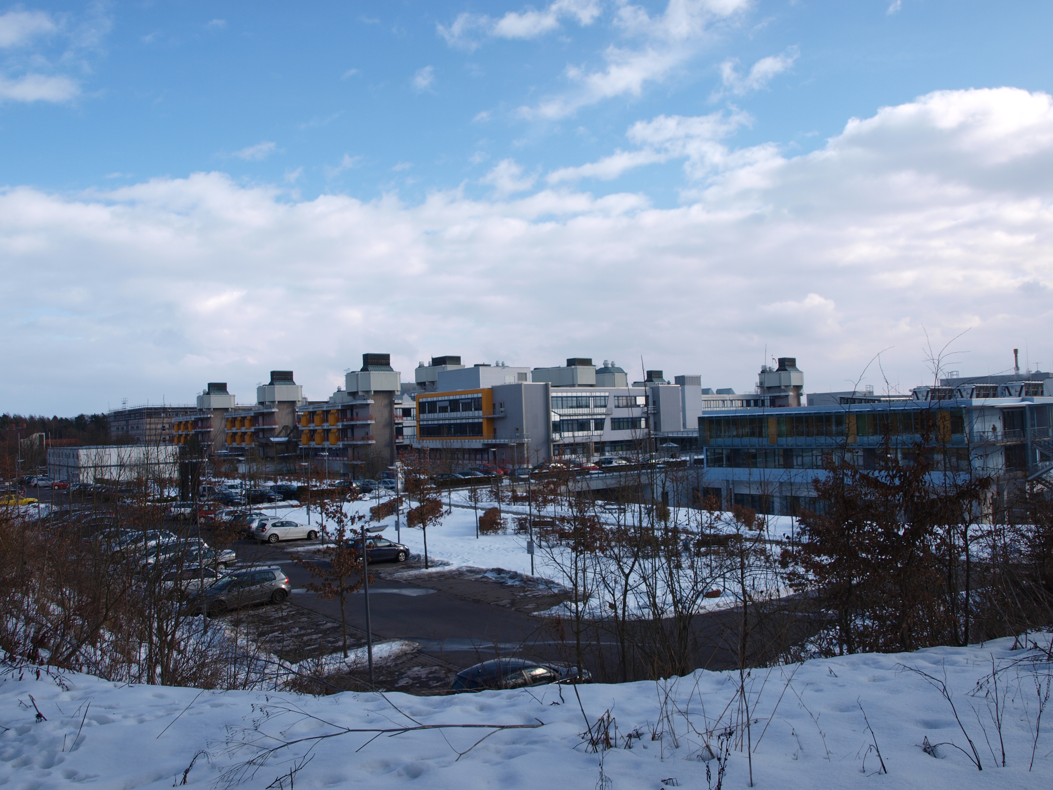 Uniklinik Marburg inkl. BA C